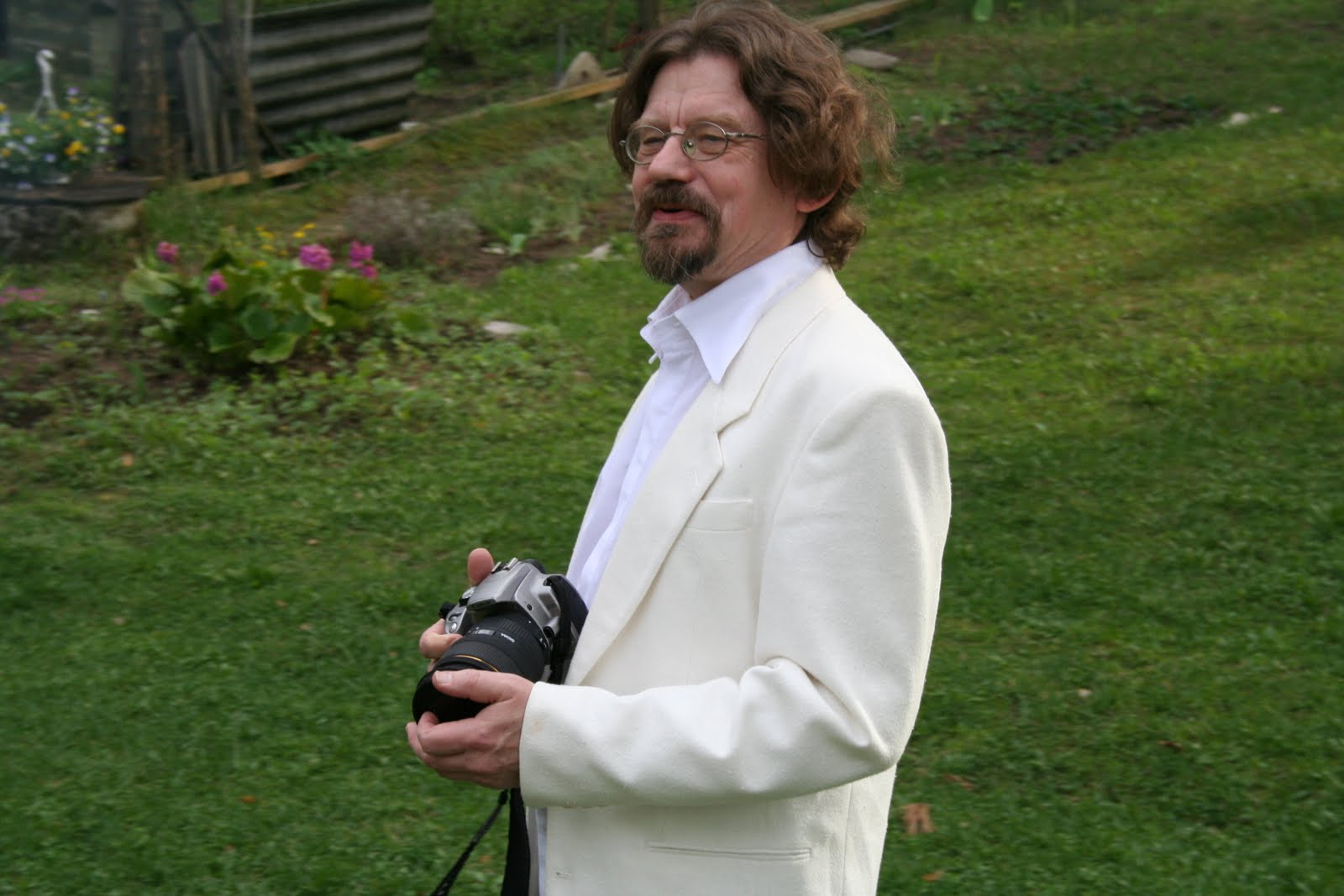 Kalju Orro 15. mail 2010 Tomi-saate hooaja lõpetamisel.